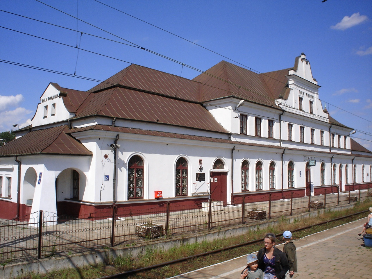 Biała Podlaska - zespół dworca kolejowego: dworzec kolejowy (zabytek nr A/771)